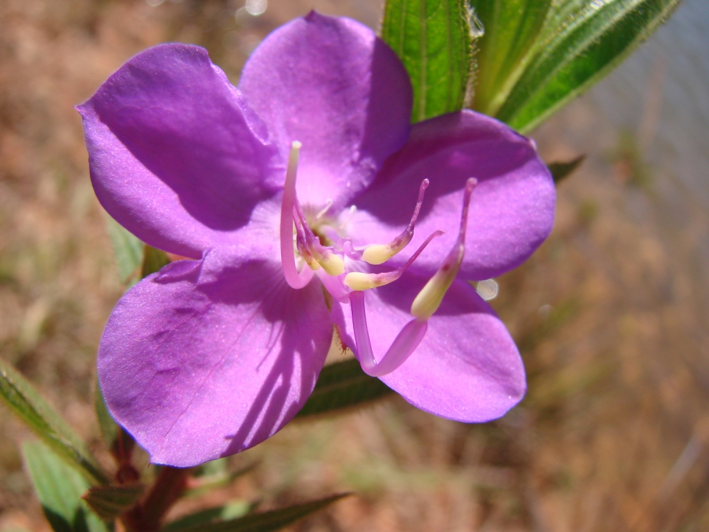 Rhynchanthera grandiflora - MELASTOMATACEAE Parque Nacional de Brasília - Distrito Federal - Brasil.